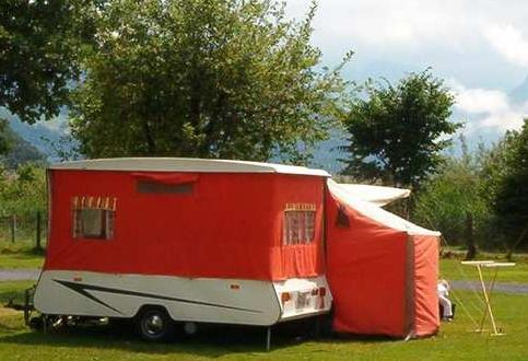 Vouwwagen